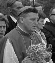 Obchody Tysiąclecia Chrztu Polski we Włocławku.